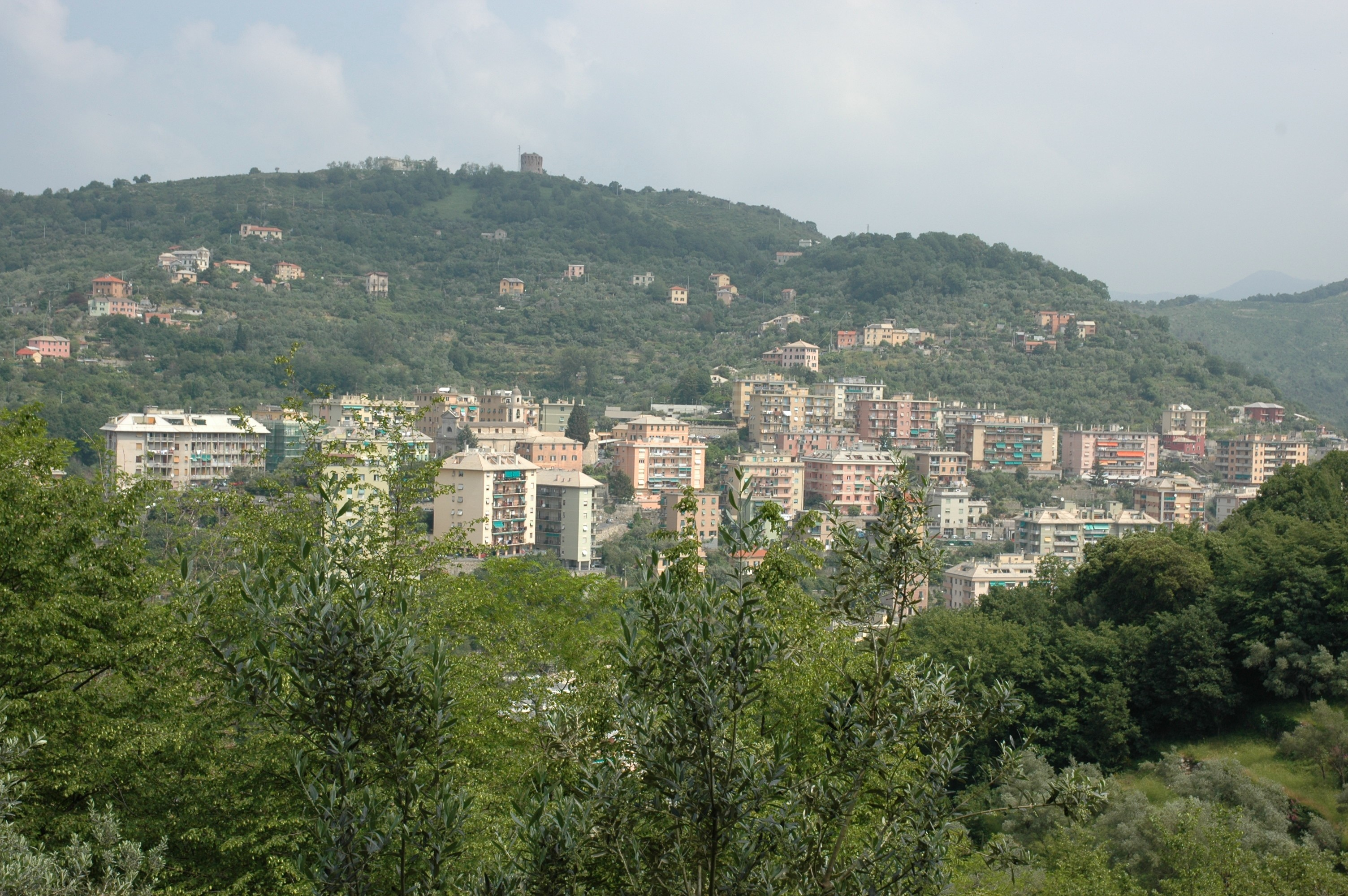 Veduta di Quezzi alta.